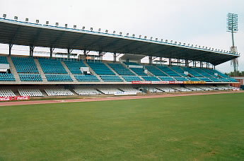 Antiguo Estadio Municipal Chapín